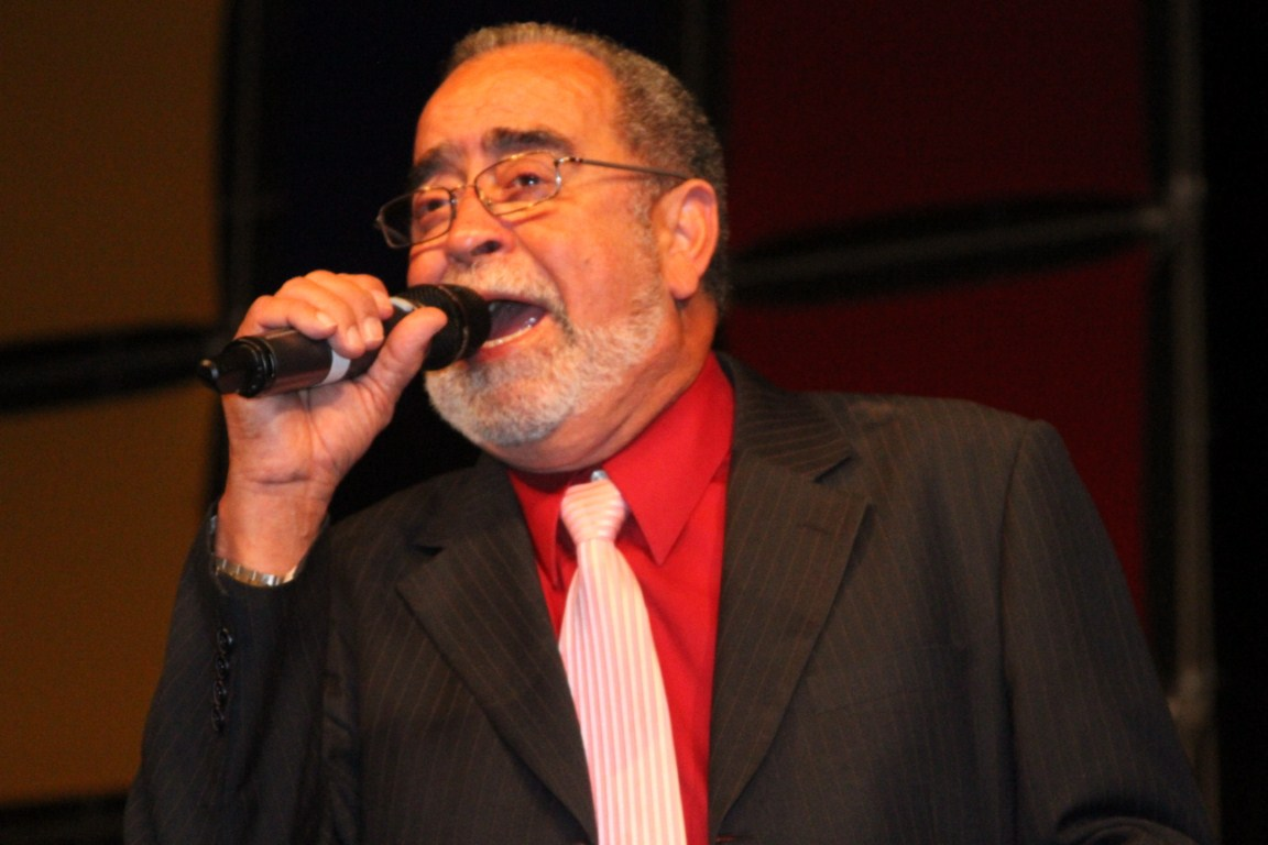 una imagen